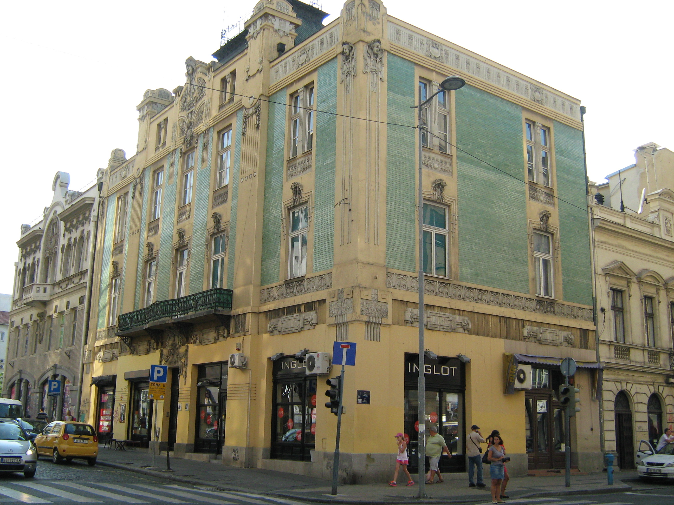 Зграда трговца Стаменковића, краља Петра 41, Београд